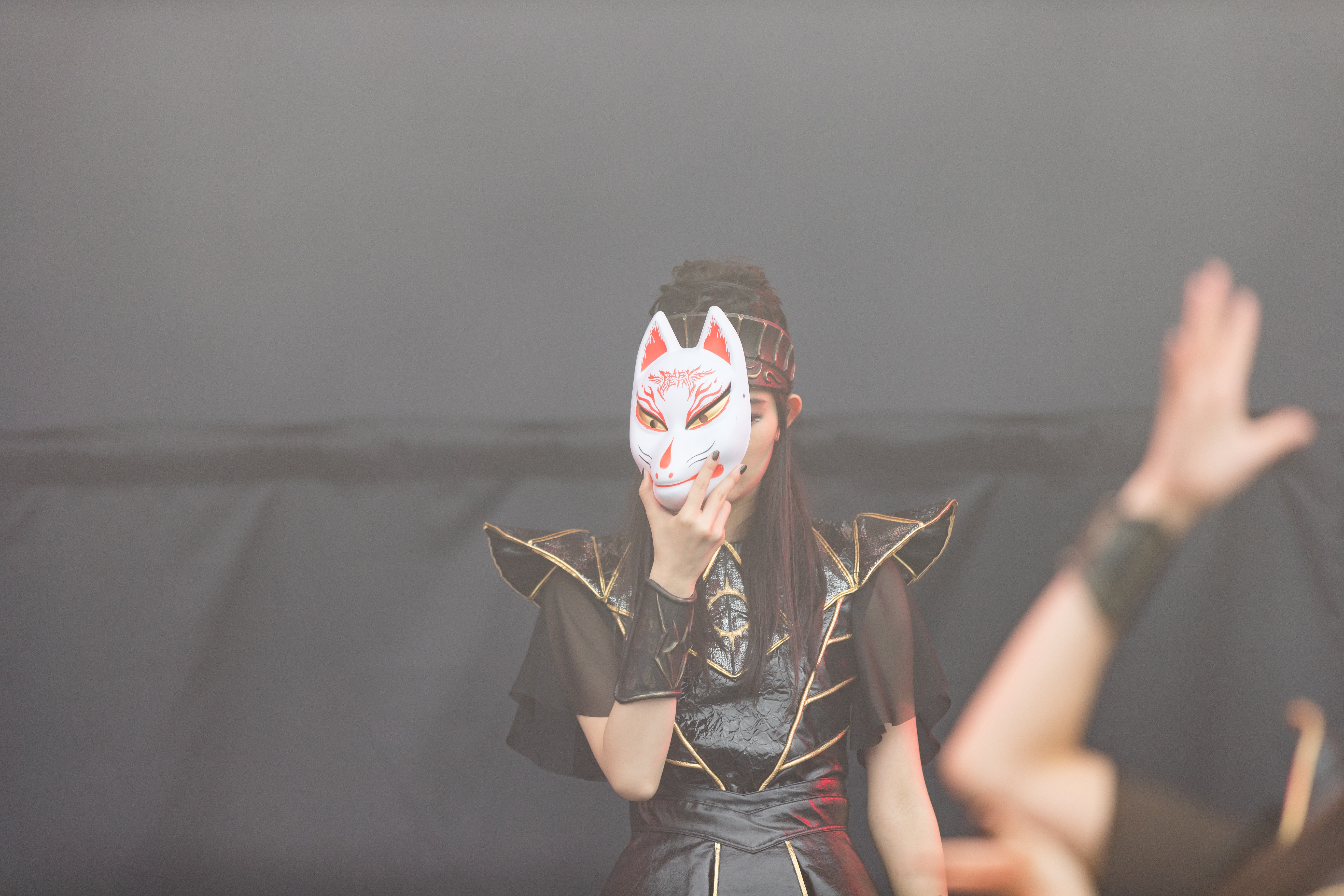 Babymetal @ Rock am Ring 2018